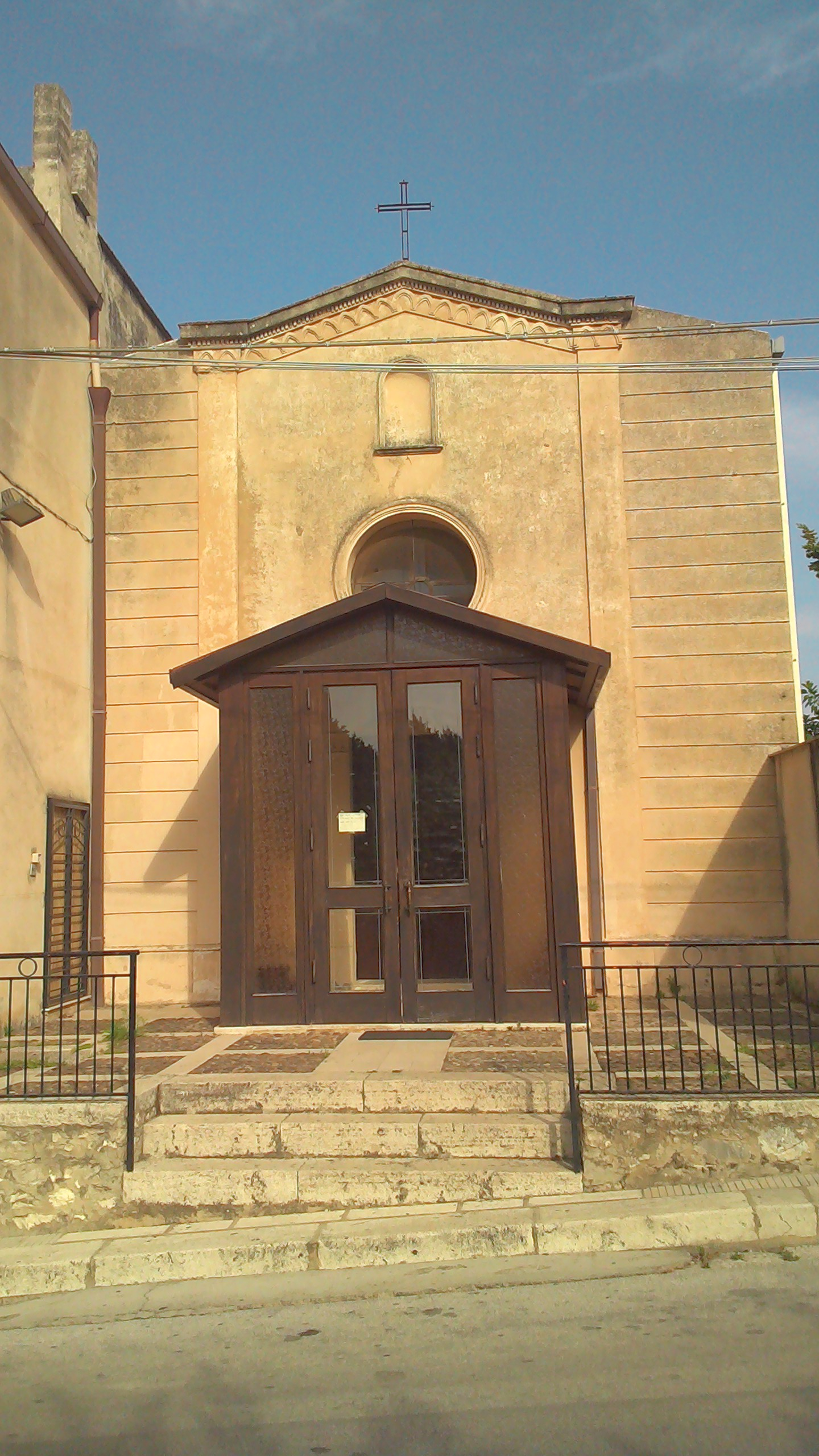 Facciata